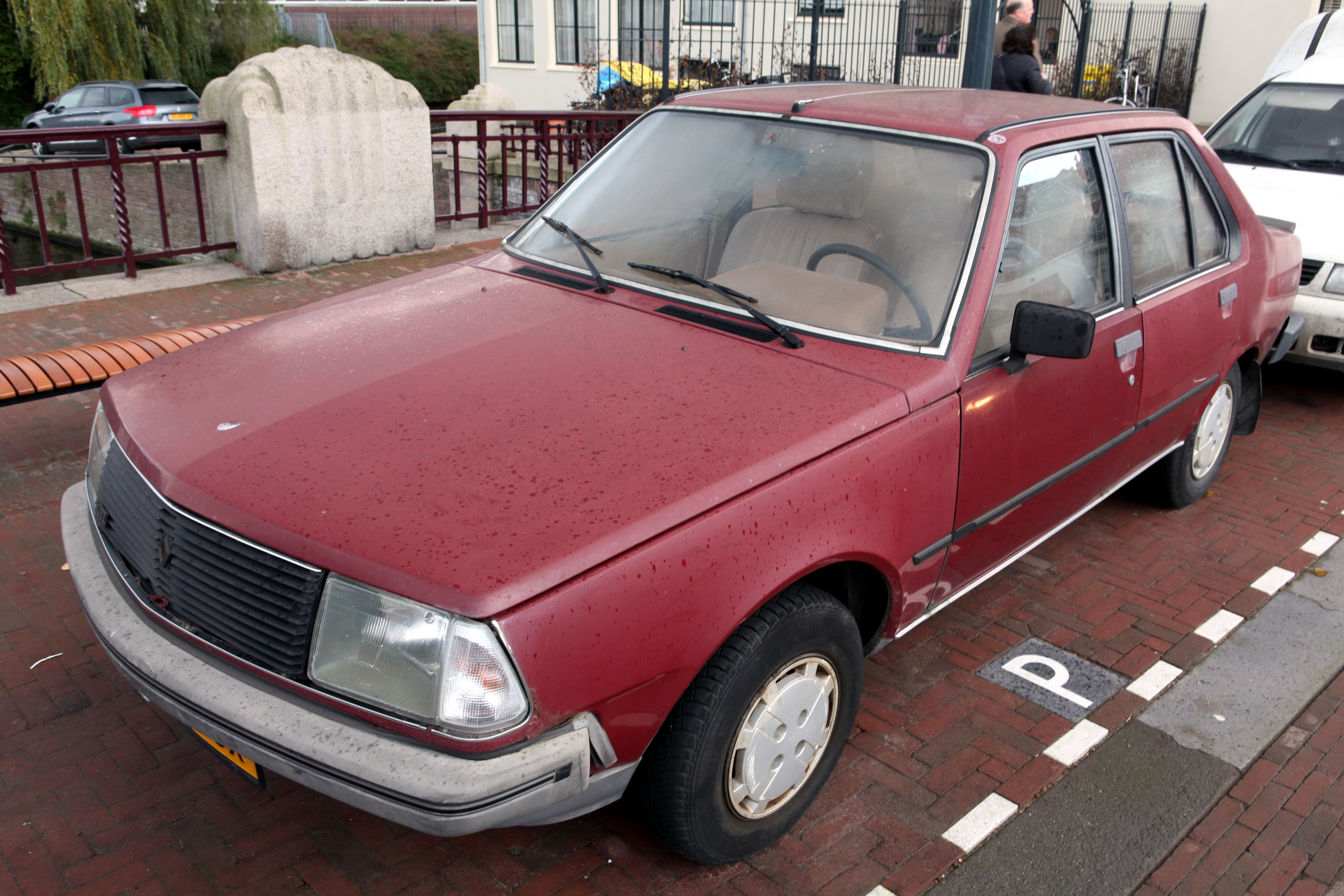 Renault 18 GTL